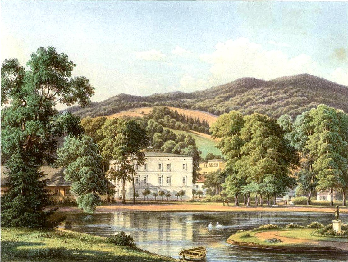 Altwasser, Kreis Waldenburg